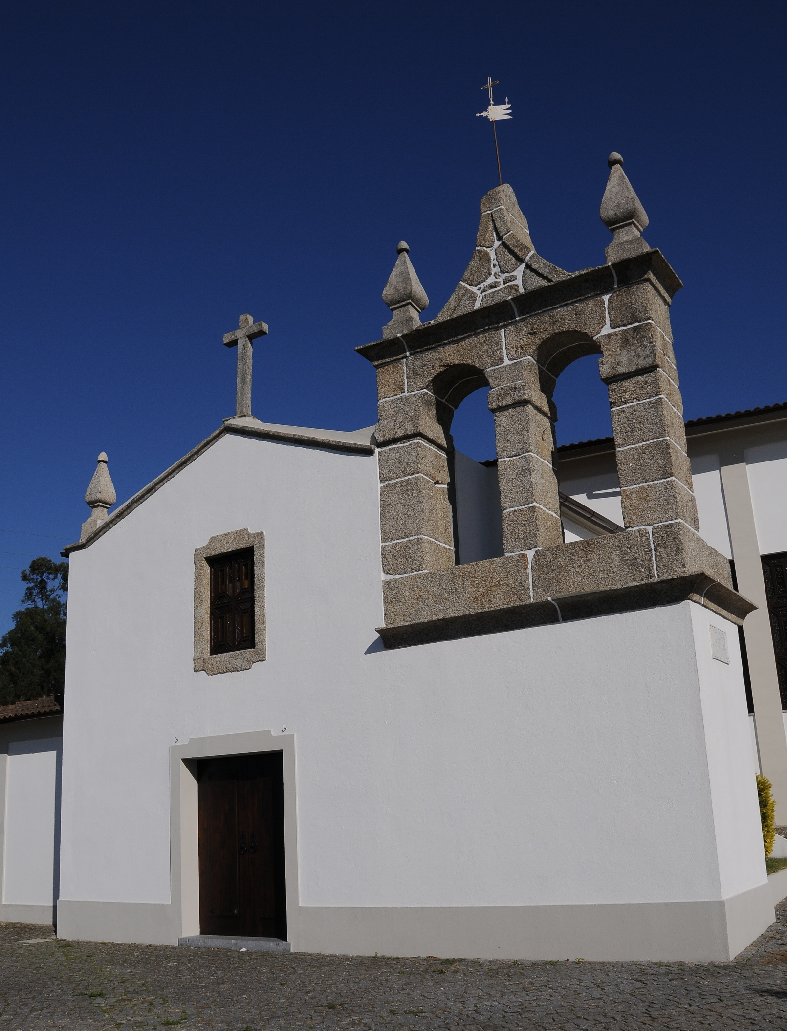 Trandeiras Church, in Braga, Portugal